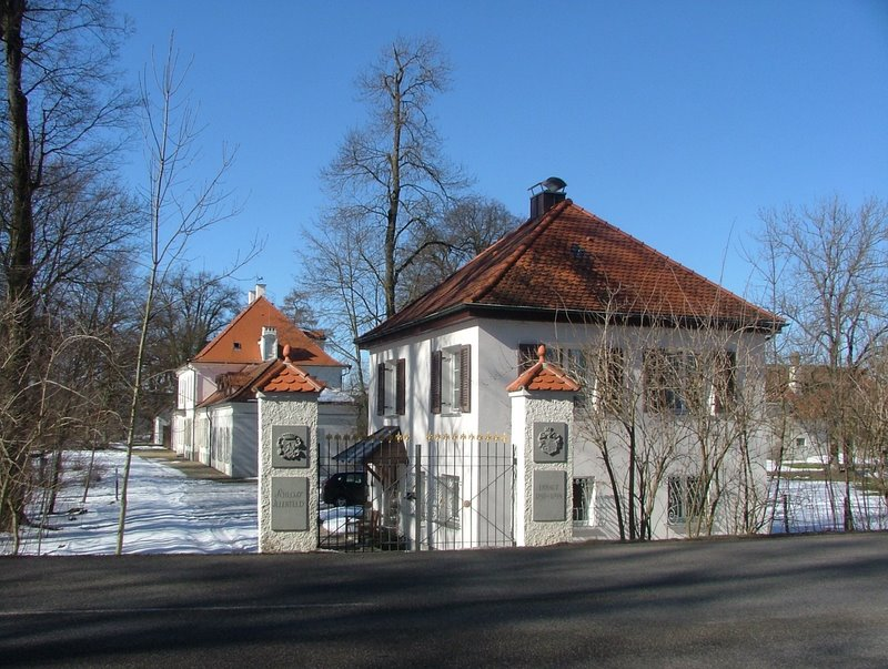 Illerfeld Eingang